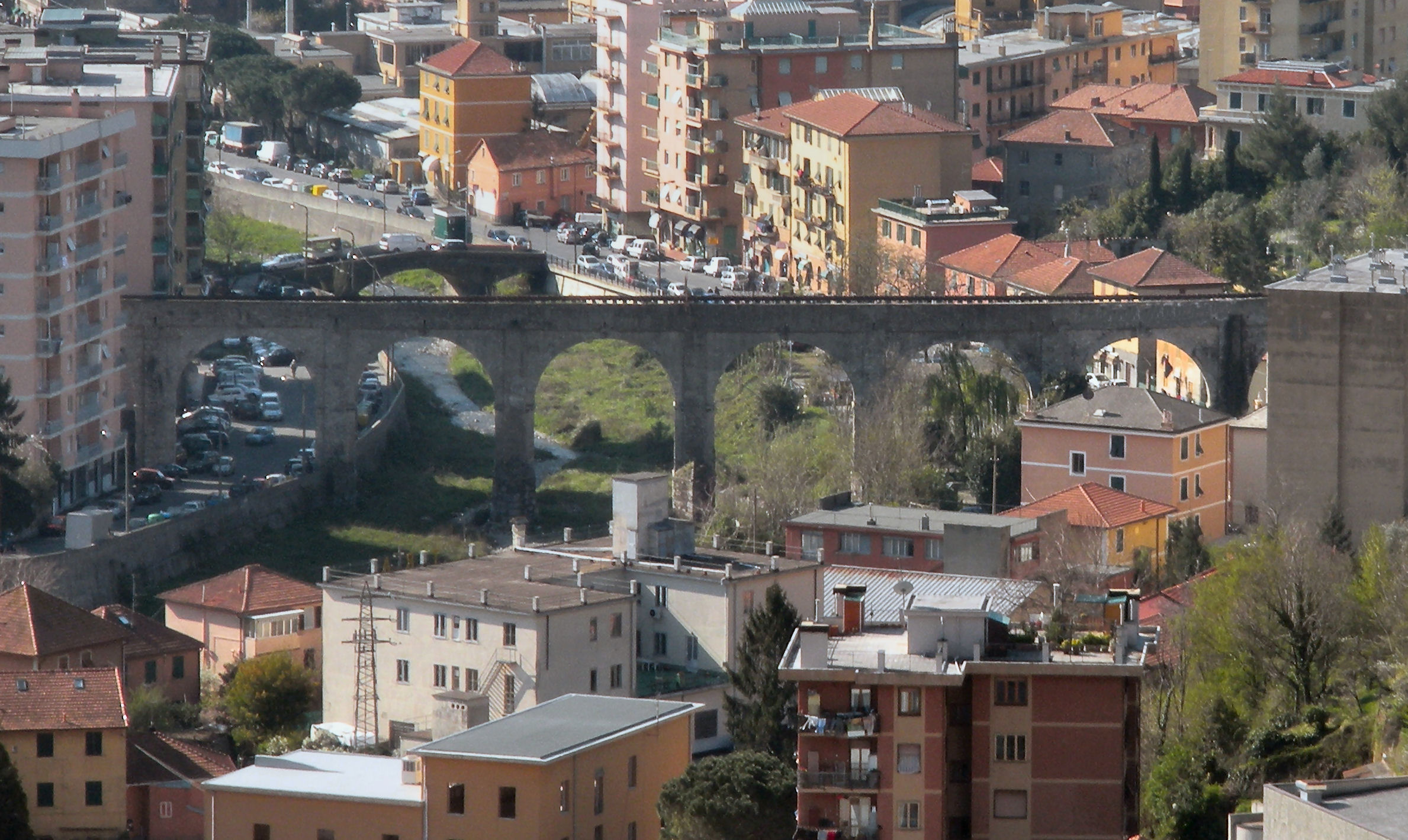 Il ponte-sifone sul torrente Geirato (Molassana, quartiere di Genova)